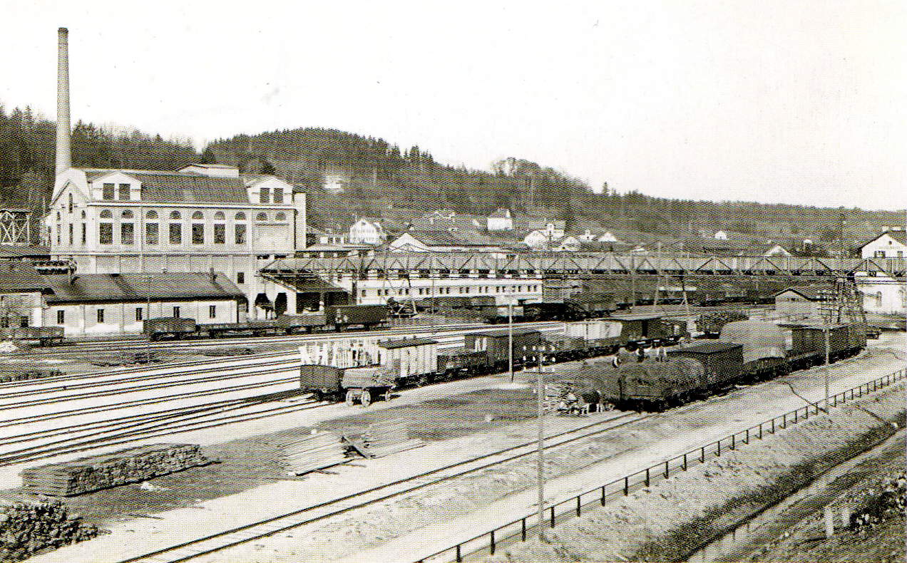 Gleisanlagen des Bahnhofs Peißenberg, links die 1907 fertiggestellte Kohlenwäsche des Bergwerks Peißenberg, rechts angeschnitten das Empfangsgebäude